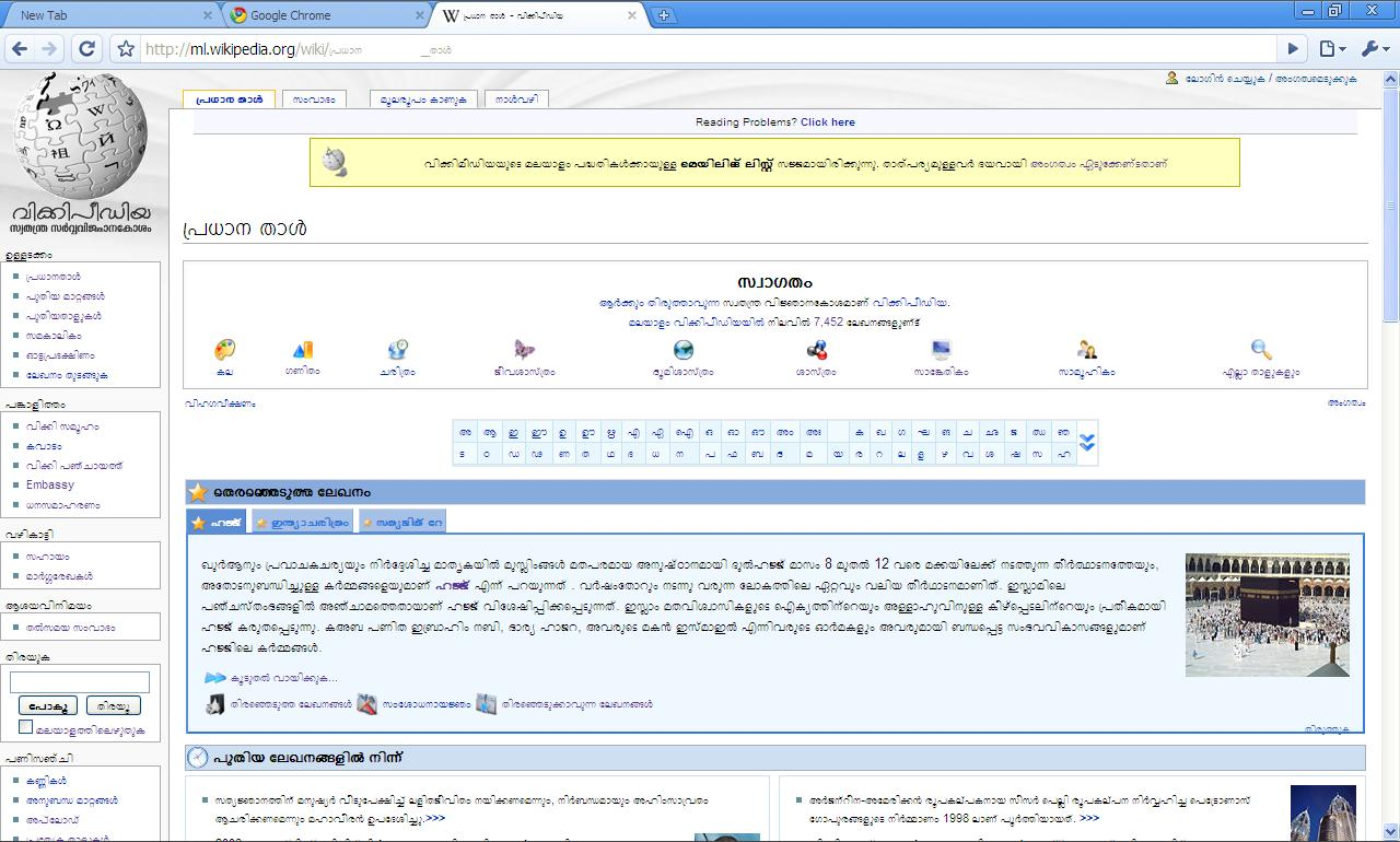 മലയാളം വിക്കിപീഡിയയുടെ താൾ ഗൂഗിൾ ക്രോം ബ്രൌസറിൽ